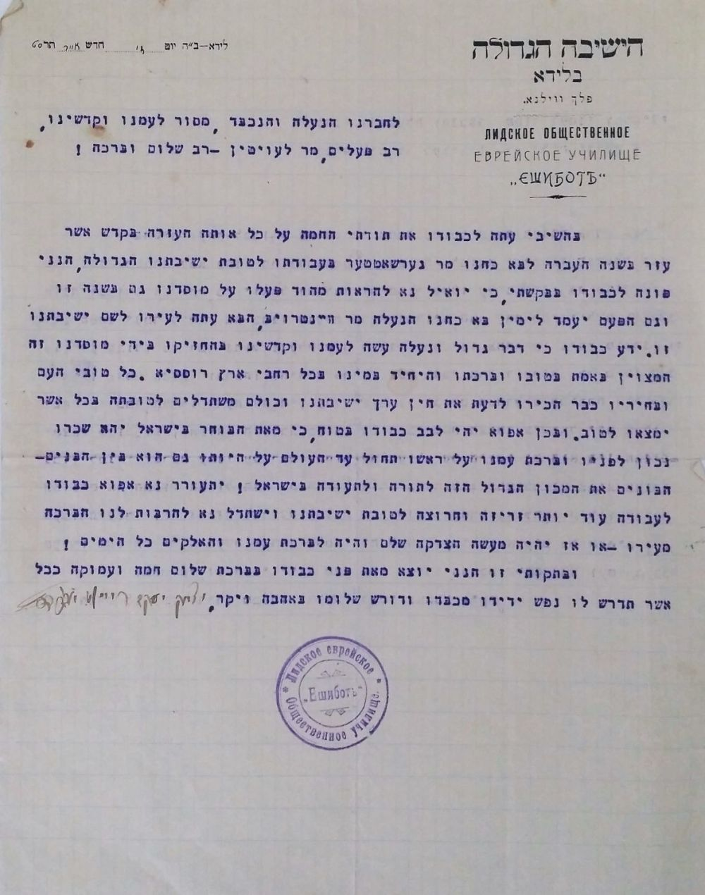 מכתב מאת יצחק יעקב ריינס, על בלנק של ישיבת לידא, בקשה מהרב לעויטין לעזרה לישיבה